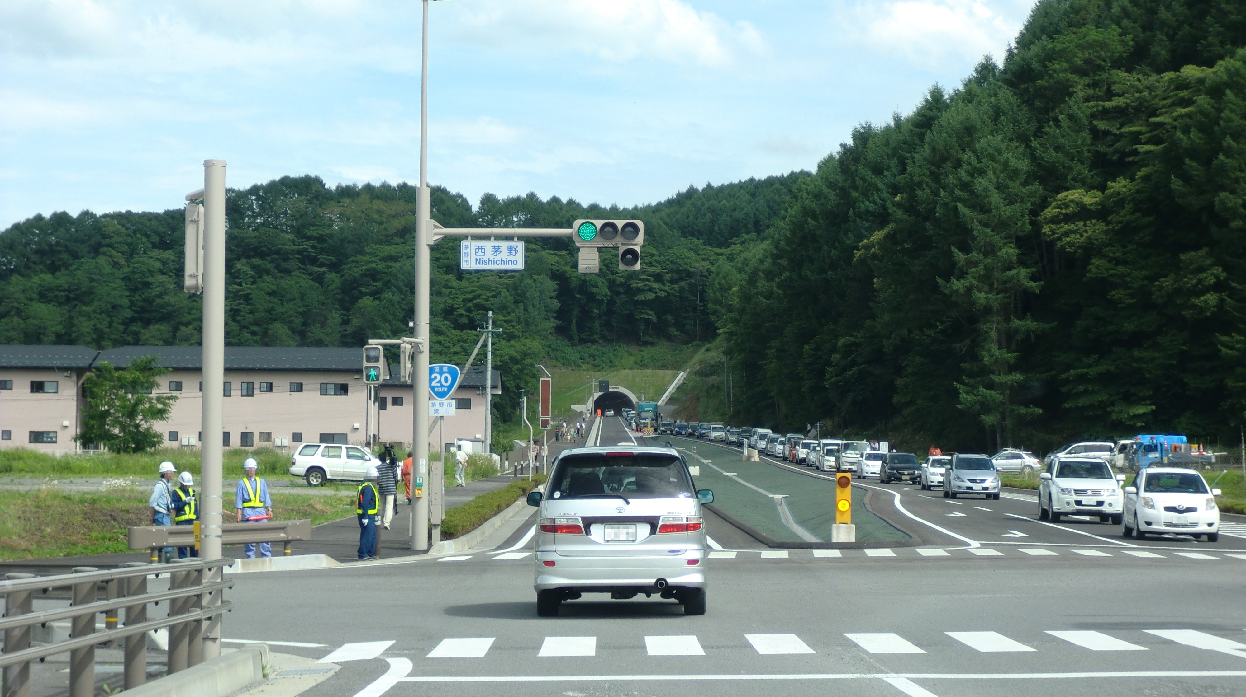 坂室バイパス 西茅野交差点 2011年6月26日撮影